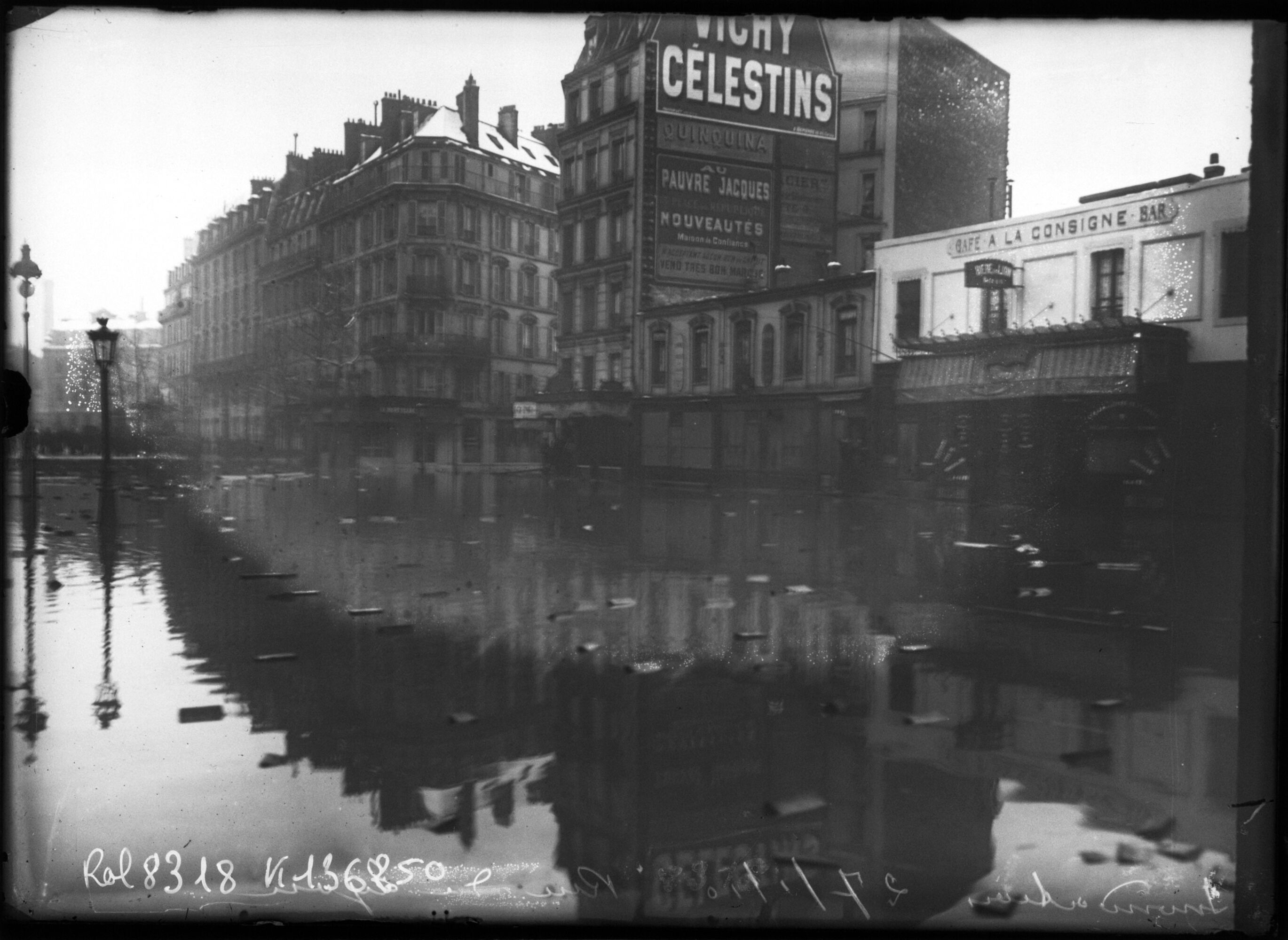 Inondation, 27/1/1910, rue de Lyon, Paris, 12e arrondissement : photographie de presse :Agence Rol